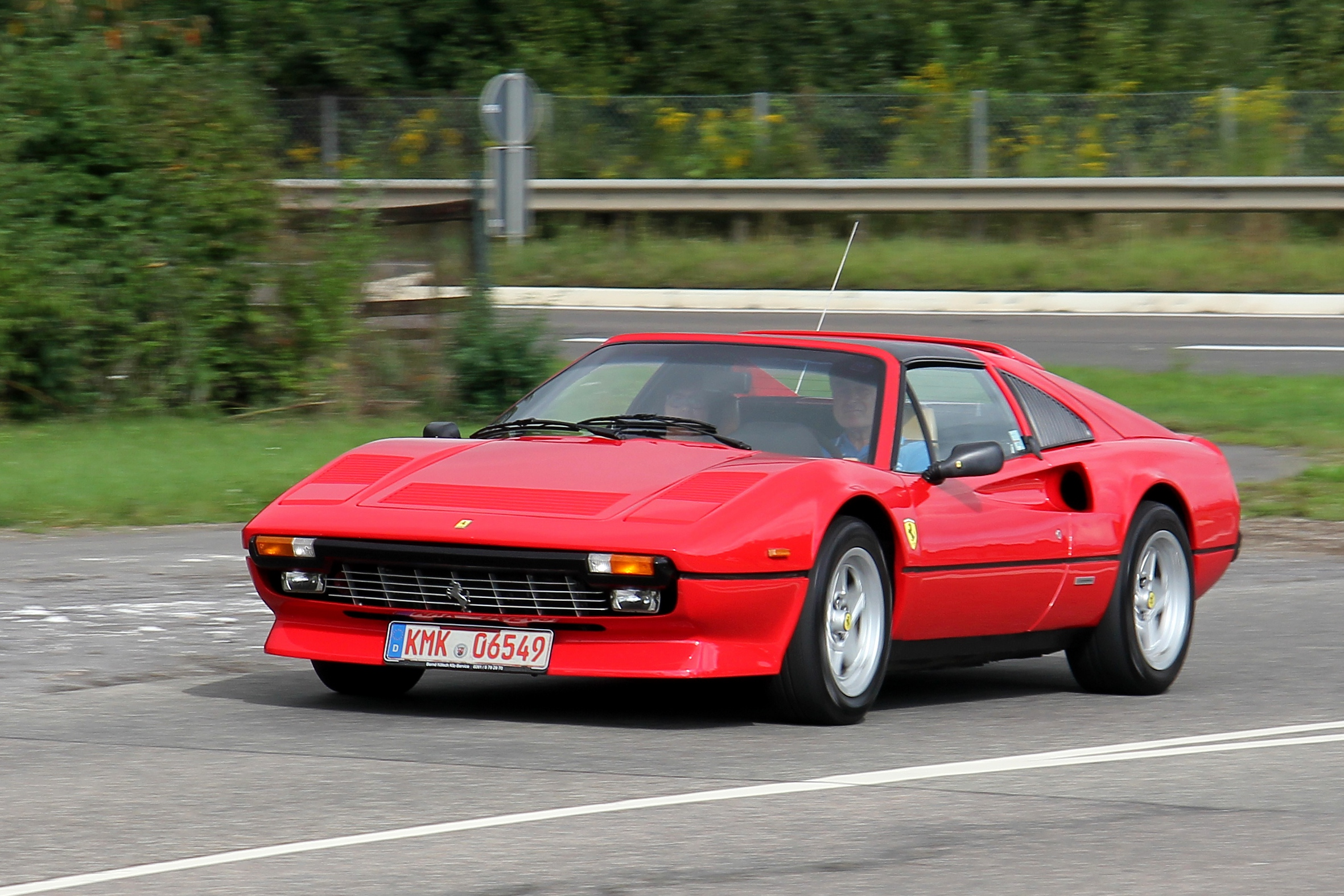 Ferrari 308 quattrovalvole, Bauzeit 1982 bis 1985, bei einer Oldtimerveranstaltung; Fantasiekennzeichen